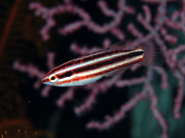 タヌキベラ Bodianus izuensis